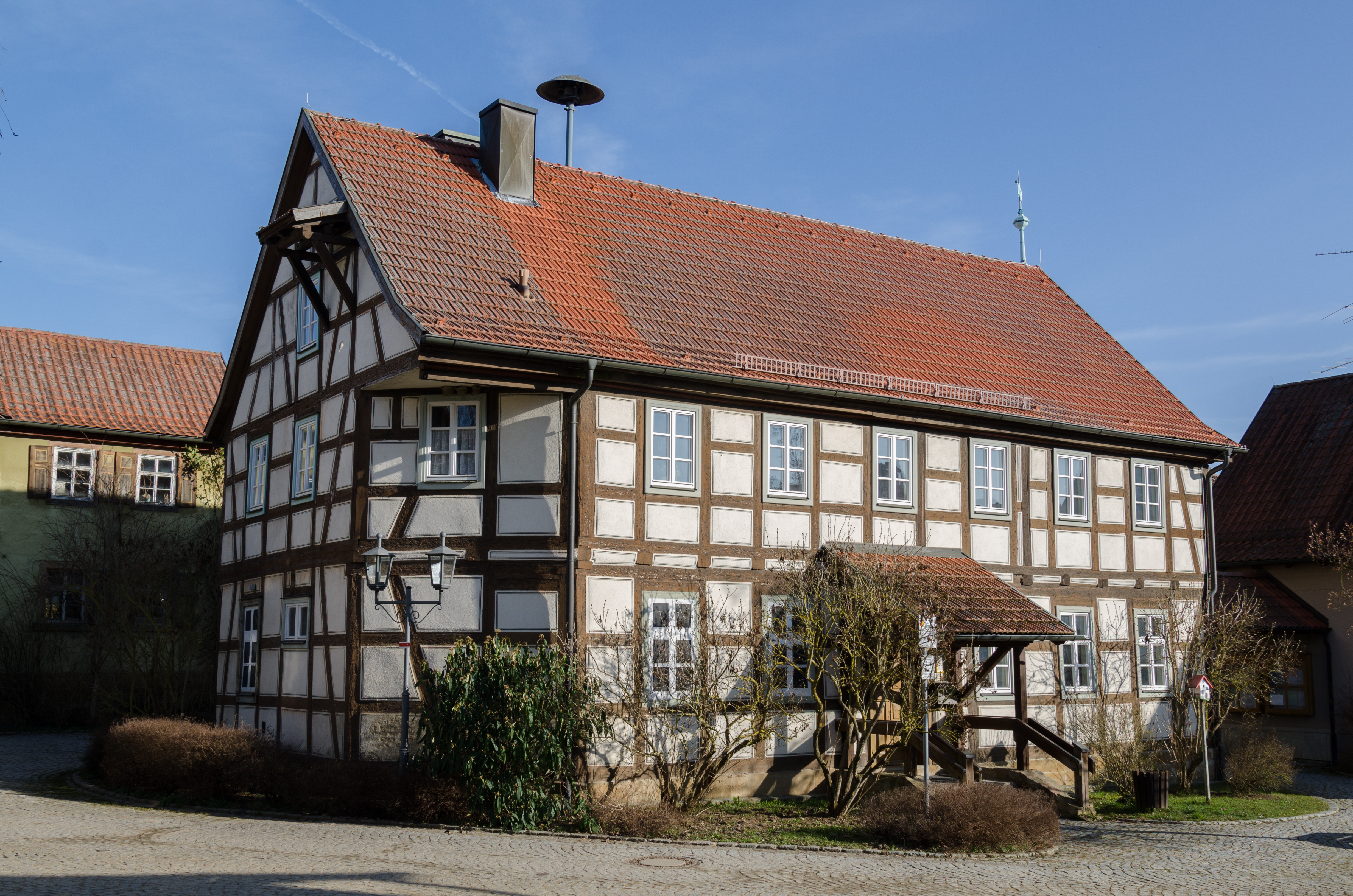 Hendungen, Rappershausen, Dorfplatz 6